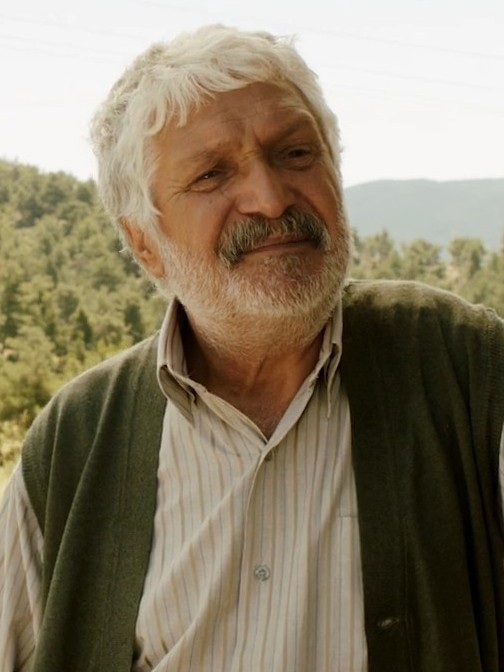 El Yazısı (2012) filminin fragmanında Salih Kalyon